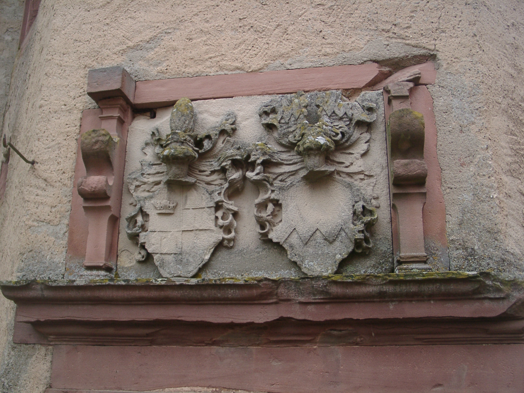 Eulschirbenmühle